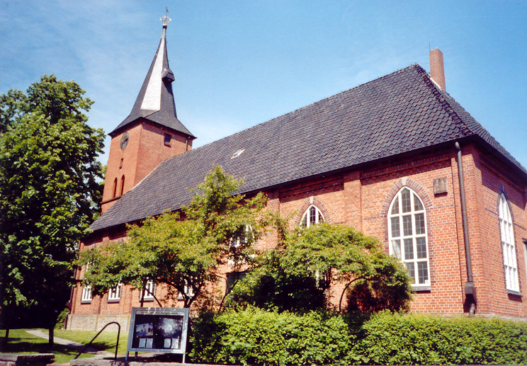 Ritterhude, ev.-luth. St.-Johannis-Kirche aus dem 18. Jh.